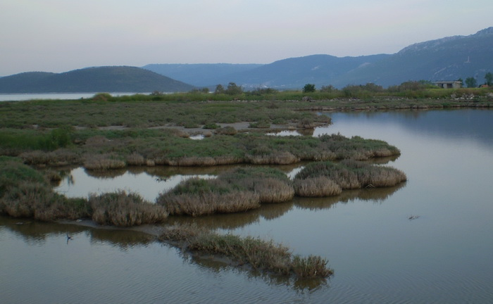 Ο υδροβιότοπος Αταλάντης